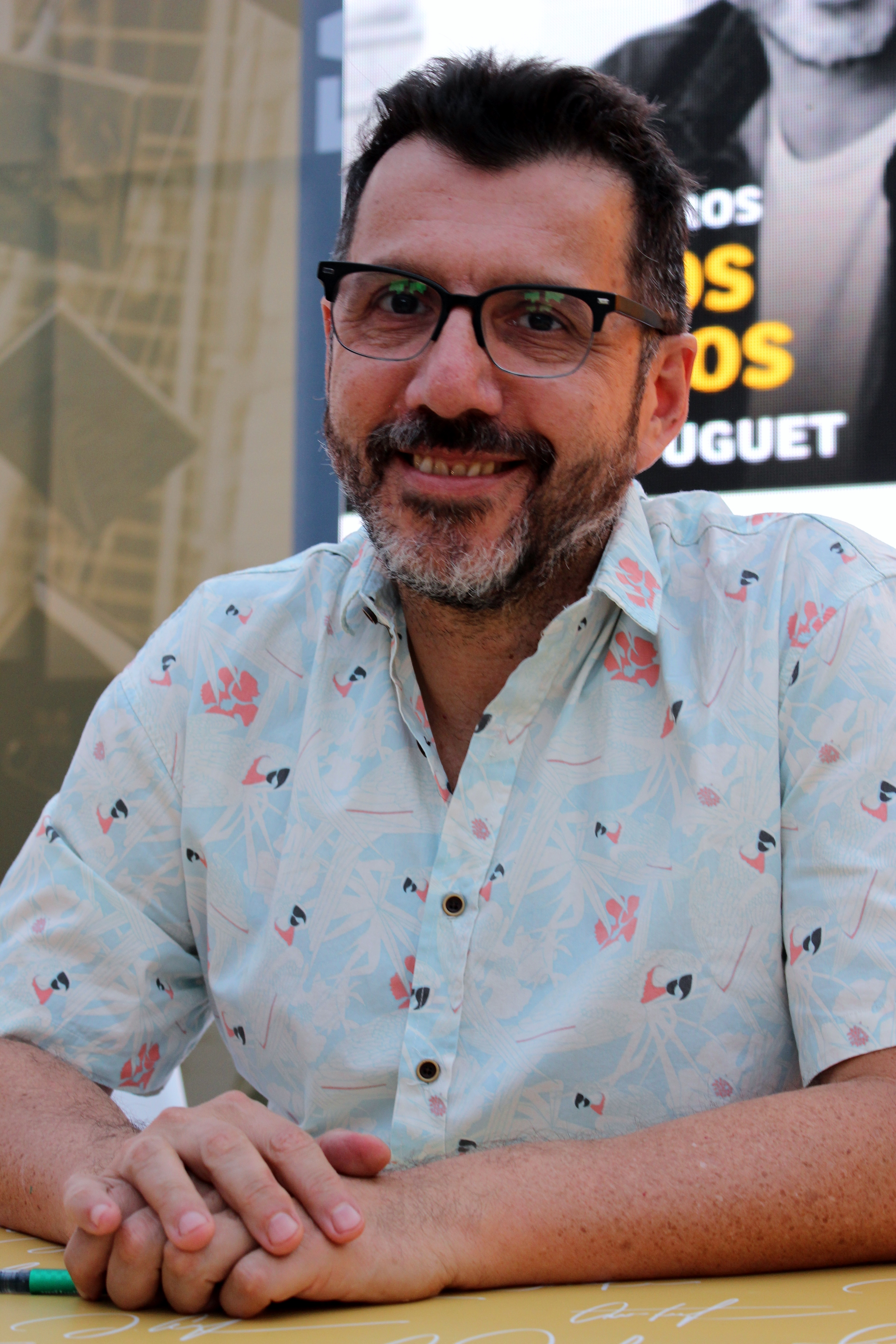 El escritor y cineasta chileno Alberto Fuguet durante una sesión de firma de libros en la segunda etapa del Festival de Autores de Santiago 2018 realizada en el GAM.